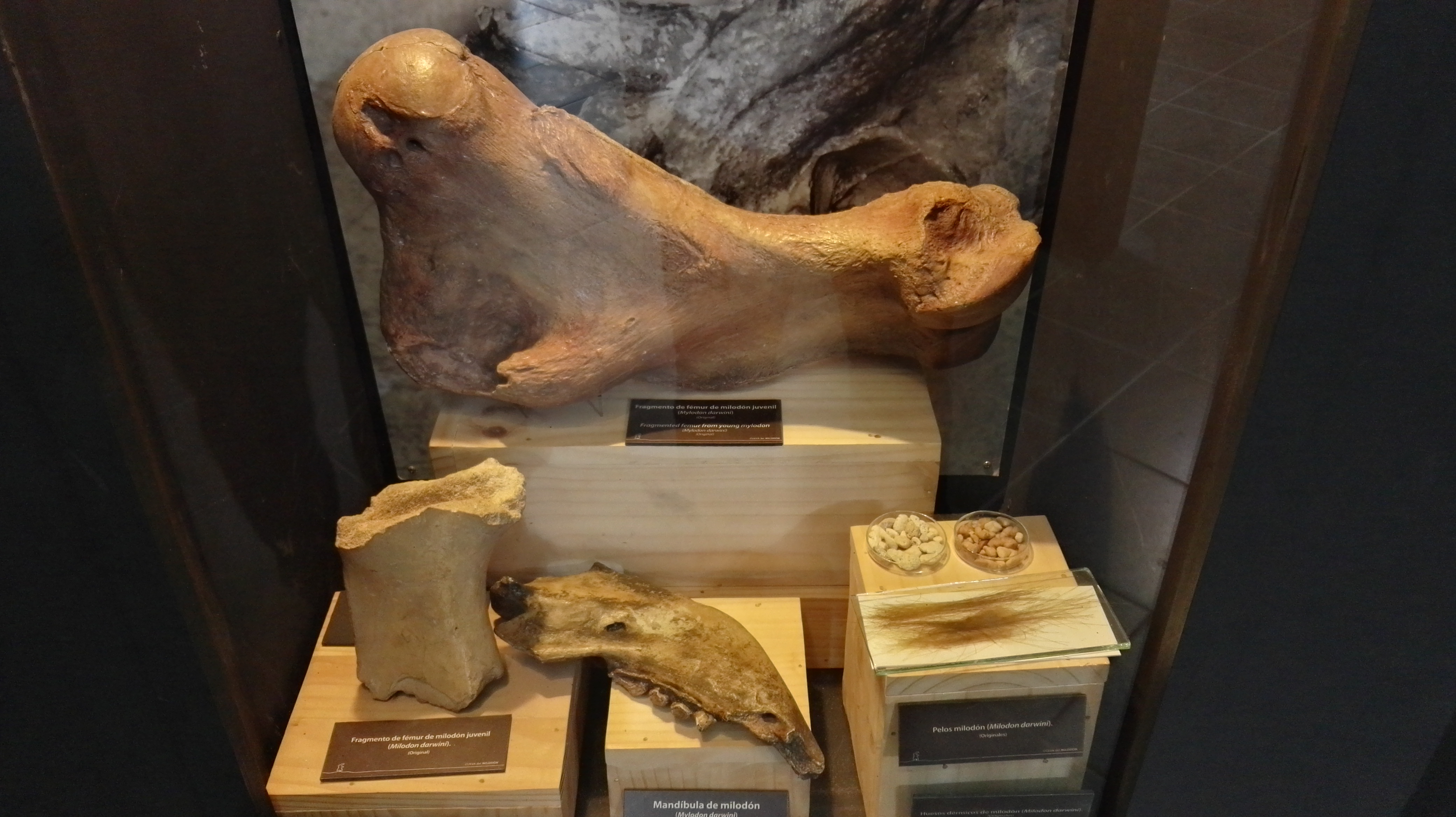 Knocken und Fell eines Mylodon ausgestellt im Museum der Cueva del Milodon